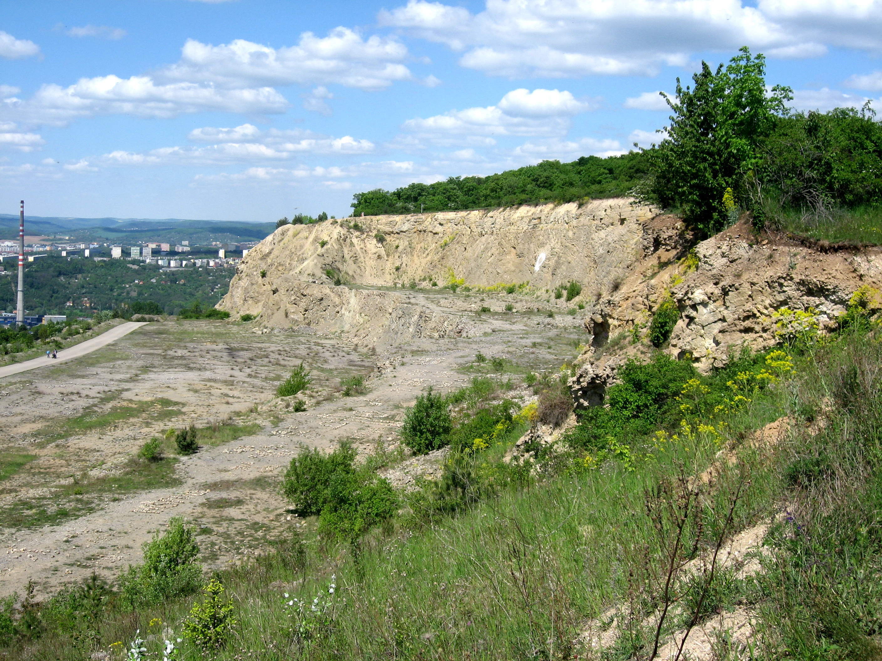 Hády, lom